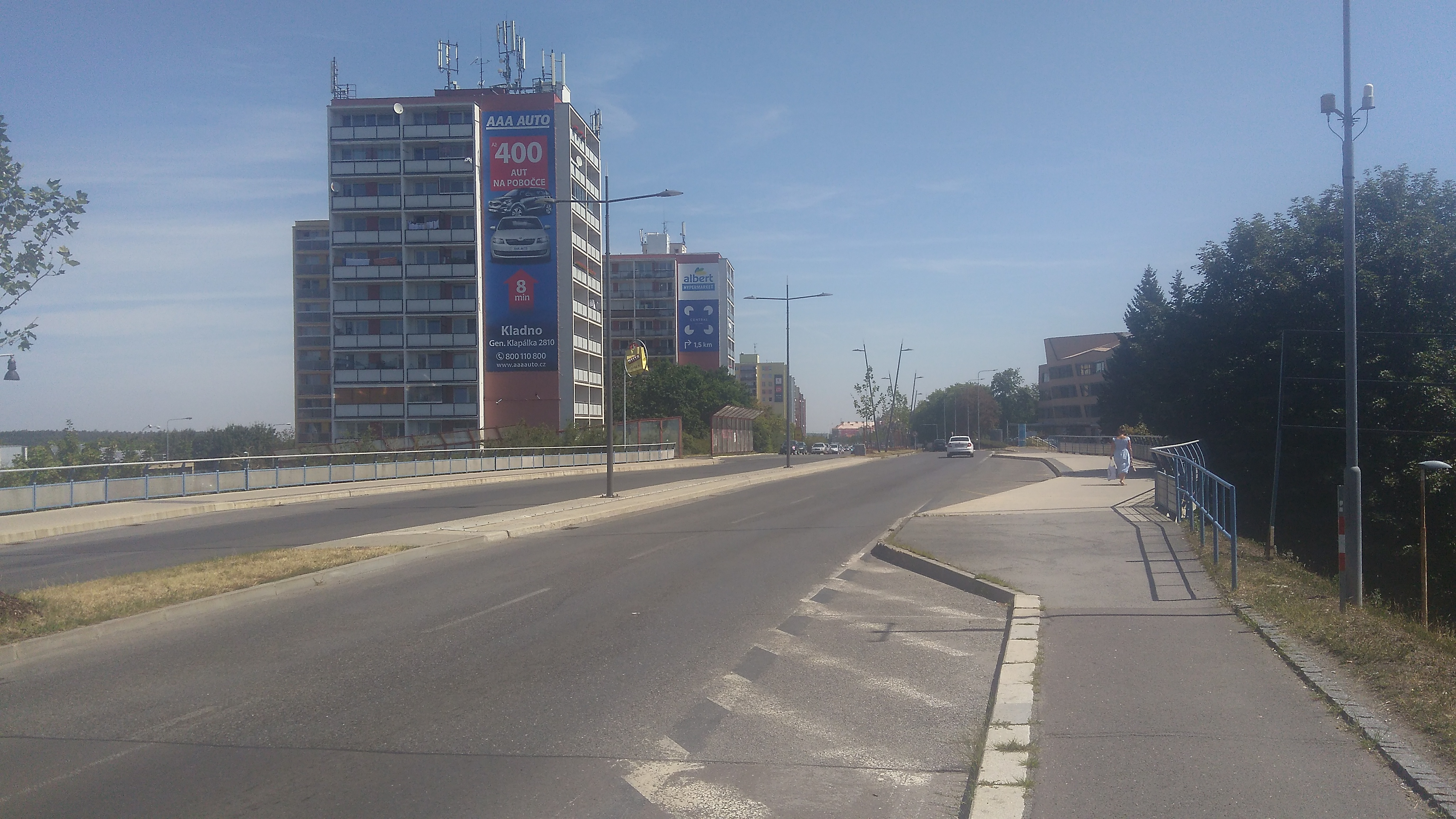 pohled na Rozdělovský most od západu